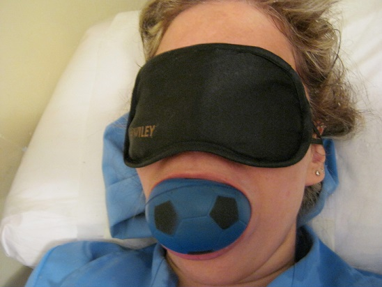 یک بانوی اسلیو ایرانی در حالت چشم بسته و توپ فشرده در دهان